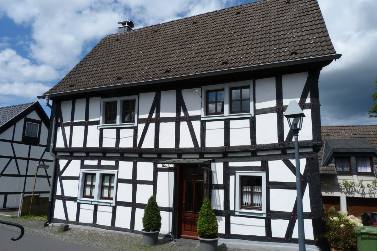 „Haus Hambitzer“, Fachwerkhaus von 1679, in Stadt Blankenberg, Renteigasse 4